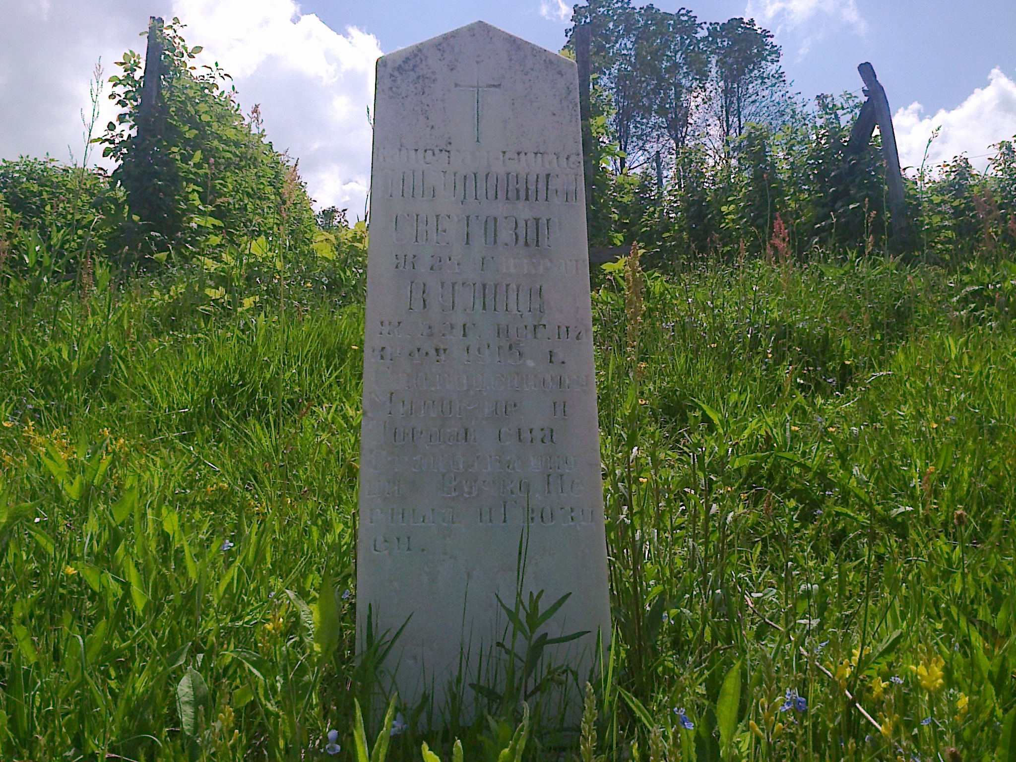 Српски (ћирилица): Крајпуташ